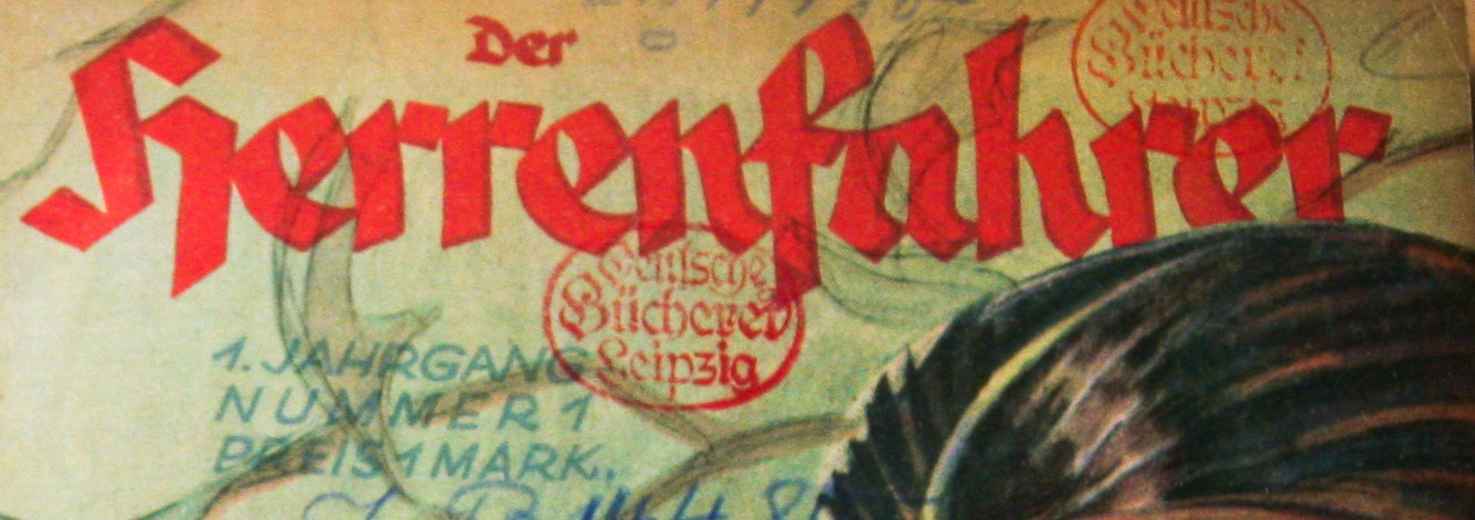 Logo des Titelblatts der Automobilzeitschrift Der Herrenfahrer vom Januar 1924